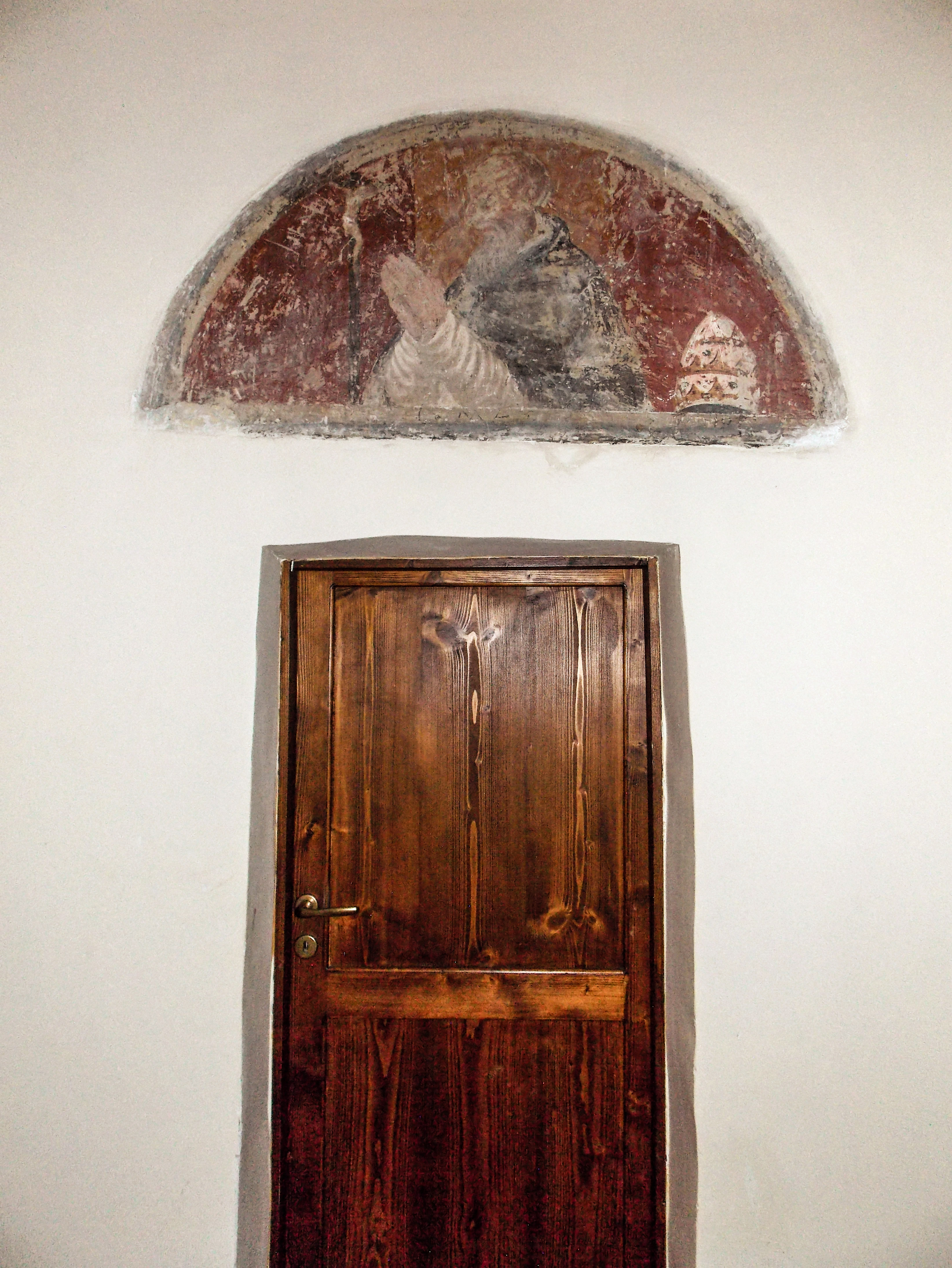 Il santuario della Madonna del Taburno a Bucciano (BN)